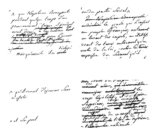 Project of the Acte de déchéance de l'Empereur